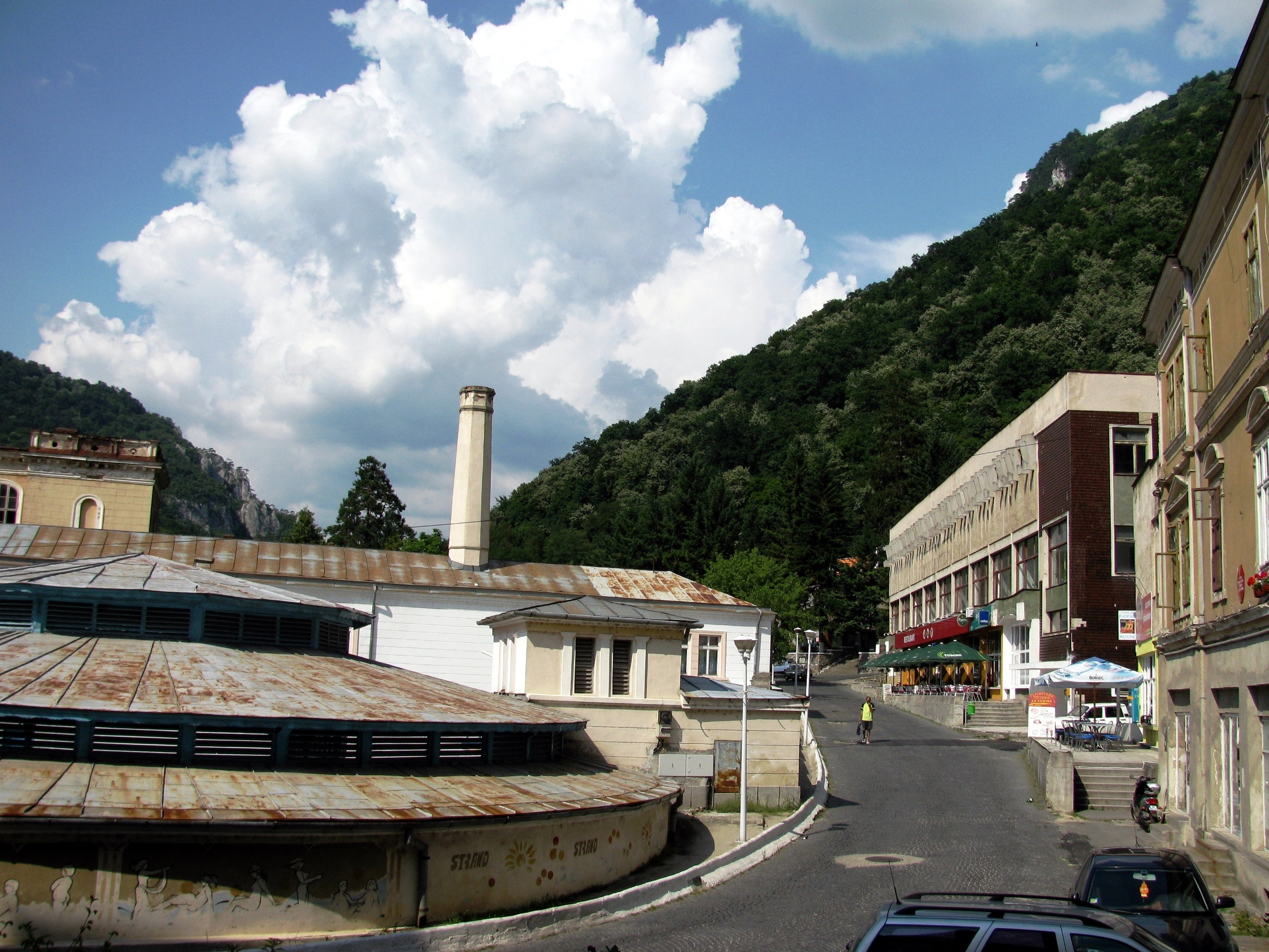 Stradul in aer liber(dreapta) si Hotelul Cerna(dreapta)